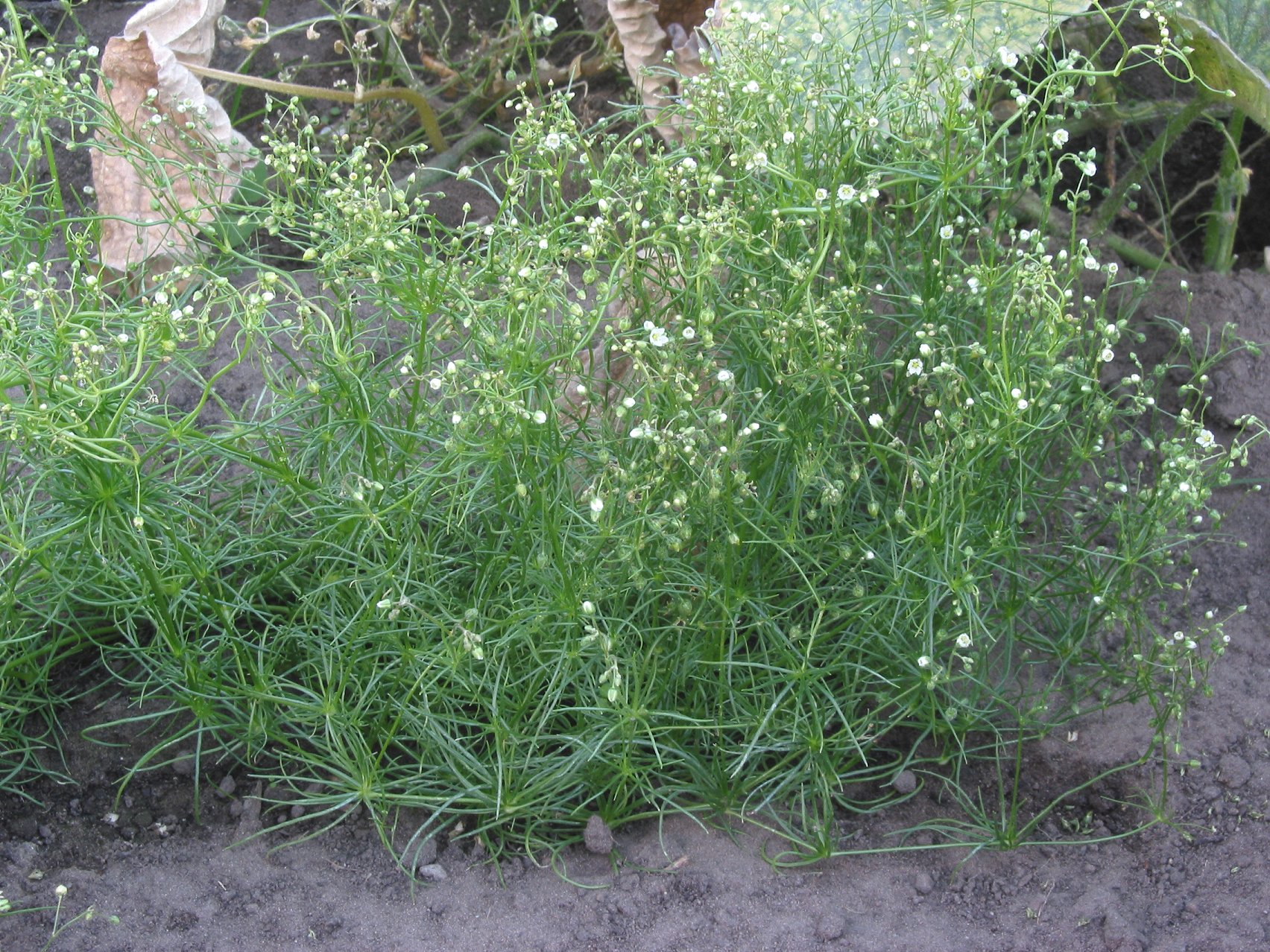 (nl: Gewone spurrie plant) Spergula arvensis